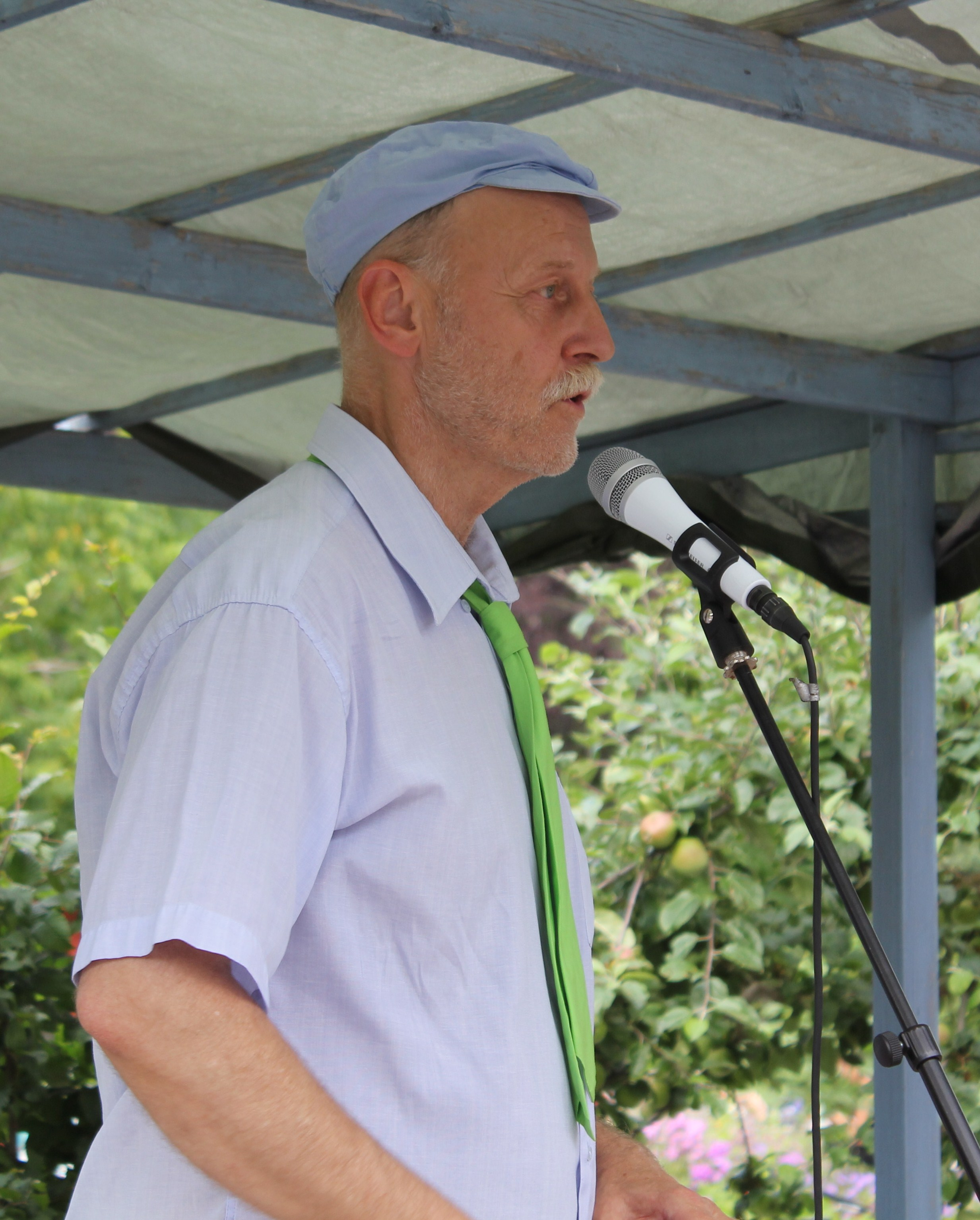 Jan Hammarlund, Visor för fred, Vintervikens trädgård 2012.